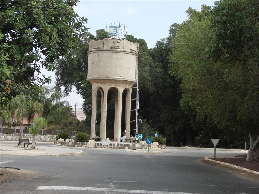 מגדל המים בכפר חיטים